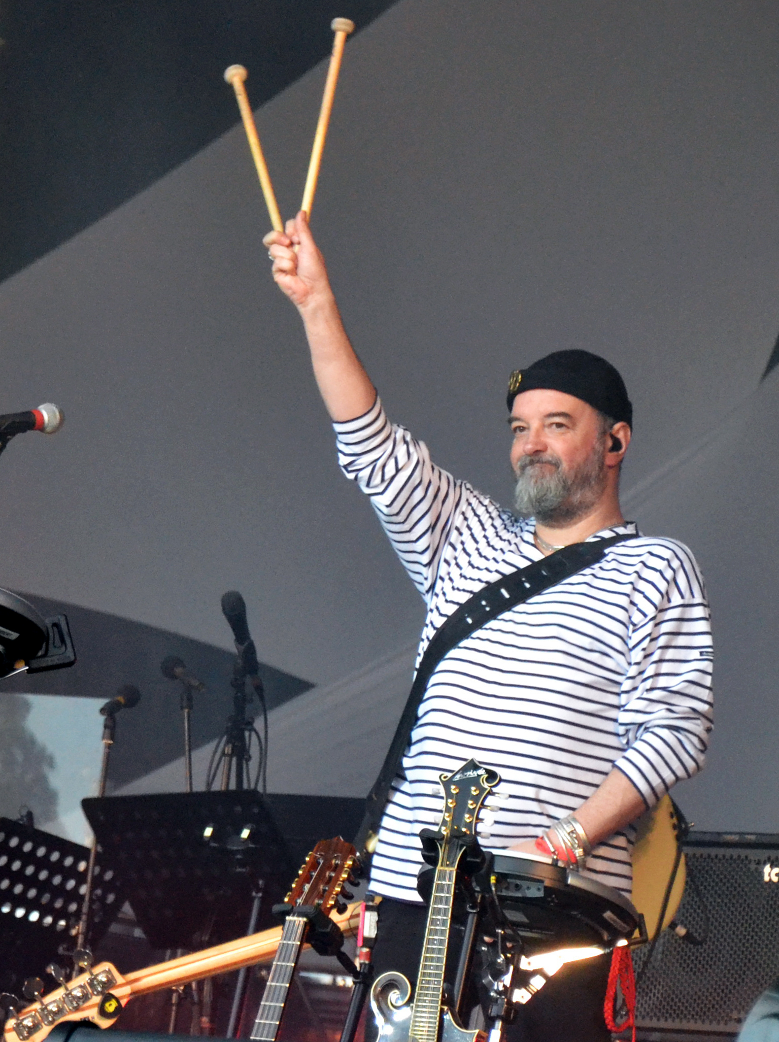 Laurent Cokelaere lors de la tournée "Bretonne" de Nolwenn Leroy en mai 2012 au Festival Papillons de nuit.